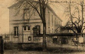 Mairie de Rouvres-en-Plaine (1869)